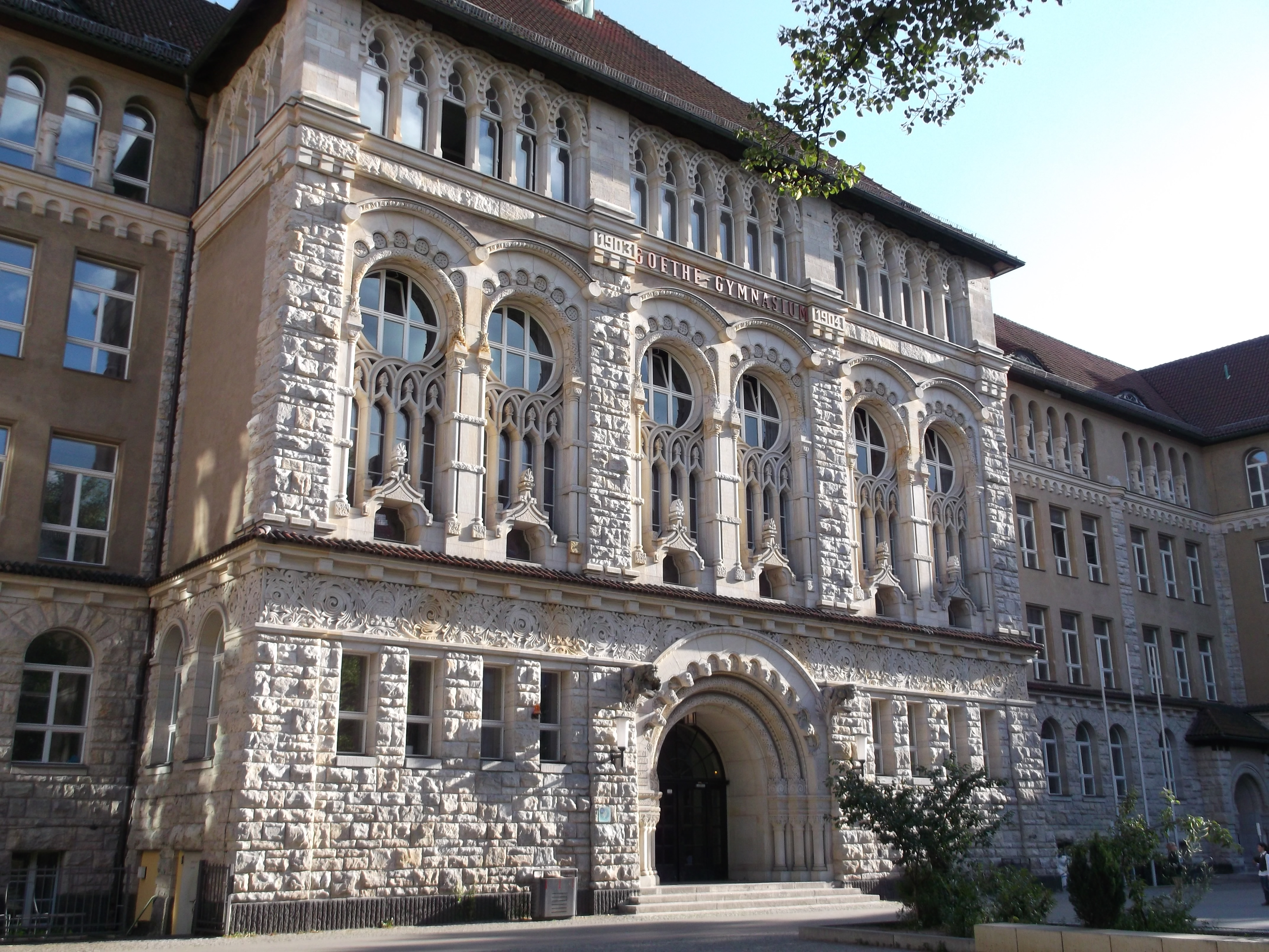 Goethe Gymnasium Berlin Wilmersdorf: Fassade mit Eingangsportal von der Gasteiner Str. aus fotografiert im Licht der Abendsonne. Die Fassade wurde vor kurzem gereinigt.